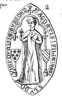 Anežka Francouzská, vévodkyně burgundská